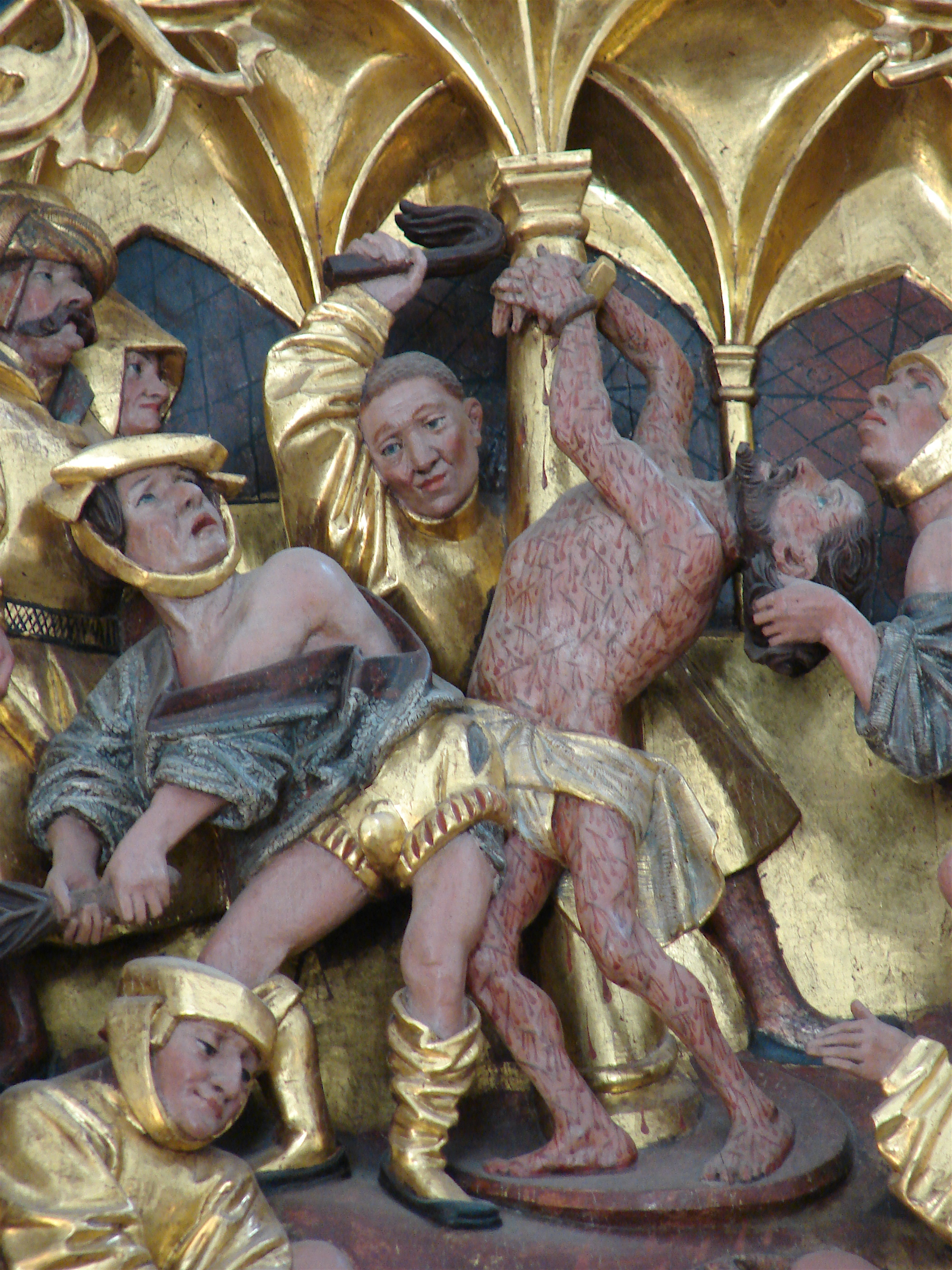 Detalje, Claus Berg, Odense Domkirke, Fyn